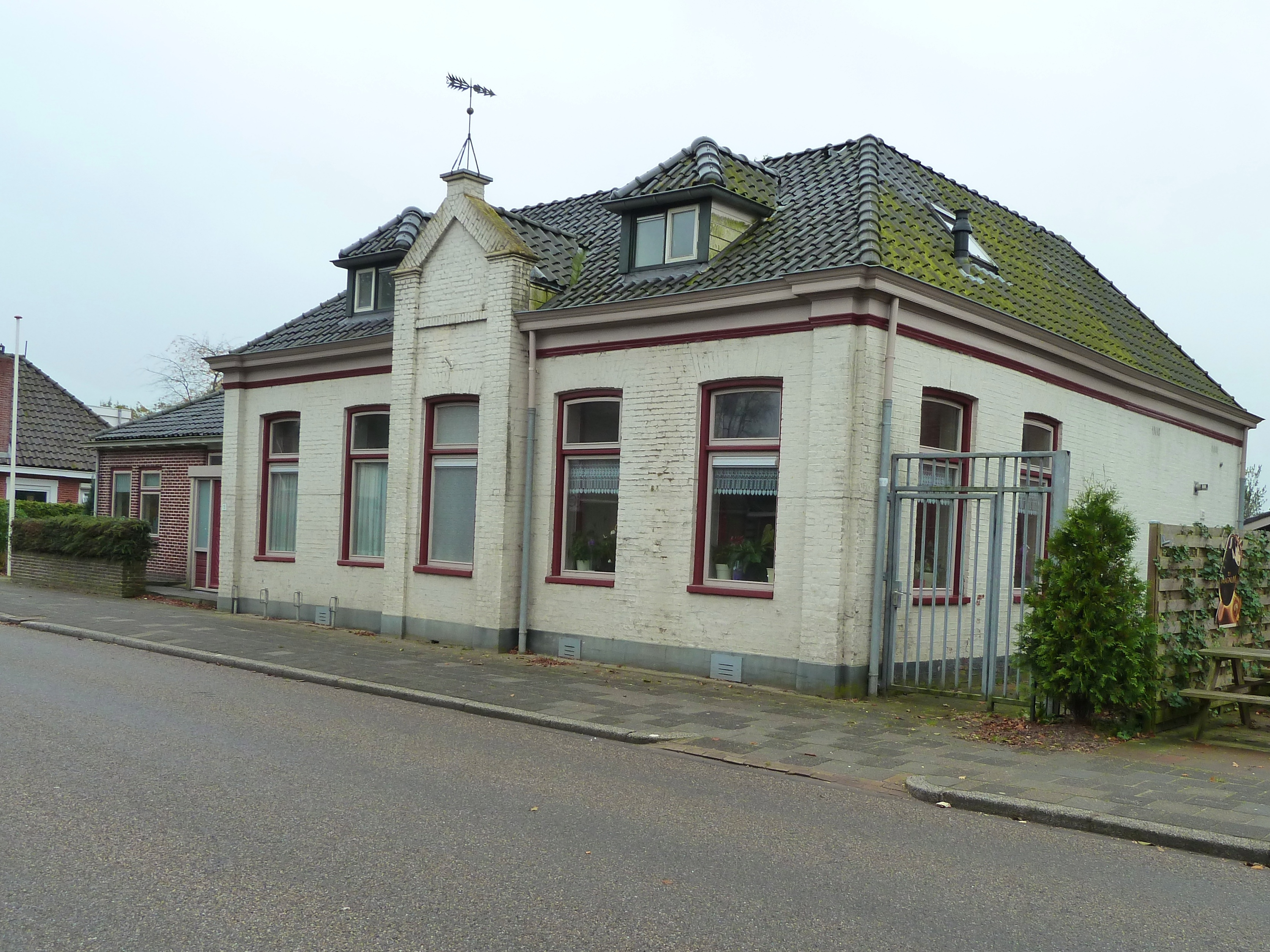 Het oude gemeentehuis van Oldekerk aan de Aldringastraat in Niekerk. Gebouwd in 1887 op de plek van het café 'Het oude gemeentehuis'.